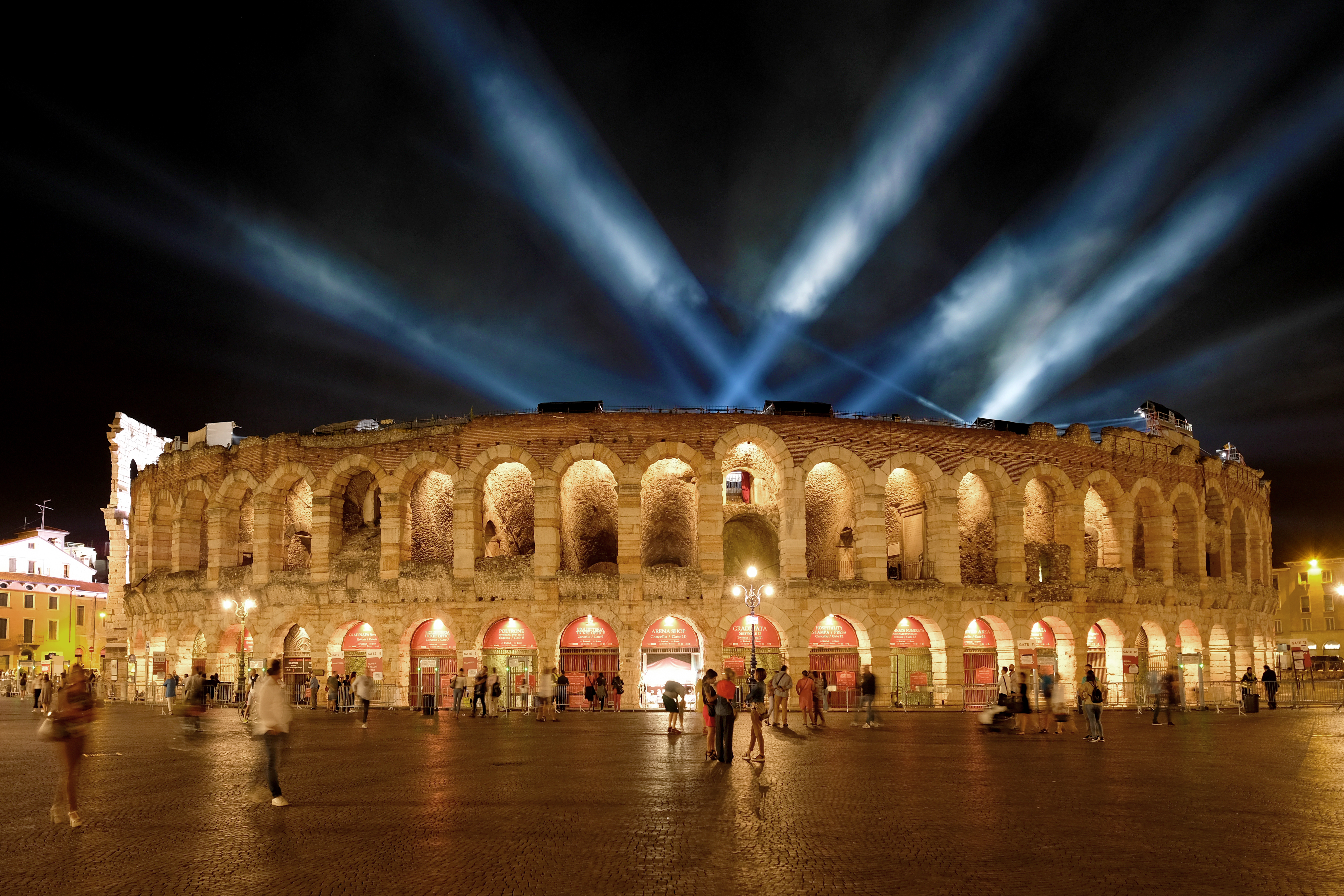 Arena di Verona This is a photo of a monument which is part of cultural heritage of Italy.